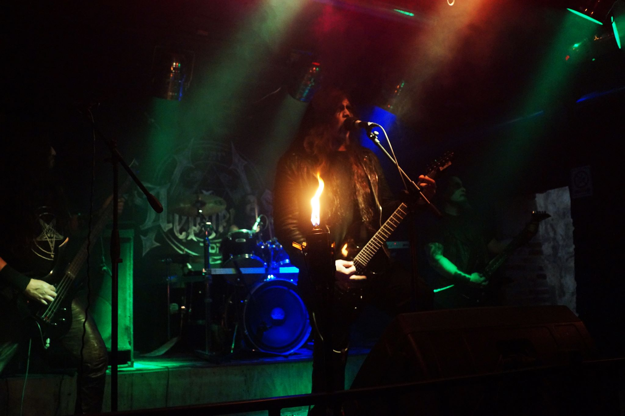 Imagen en vivo "Valparaiso" 2014